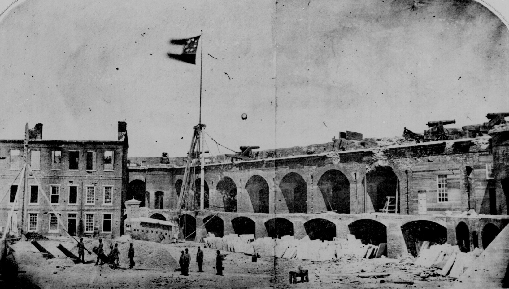 Le fort Sumter après l'assaut d'avril 1861. Photo de 1861